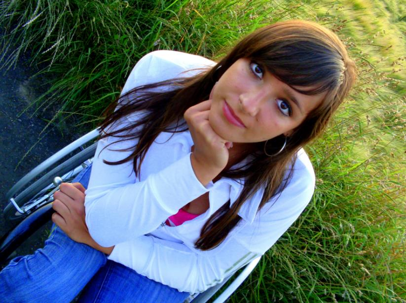 Tereska Starzec - niepełnosprawna lekkoatletka